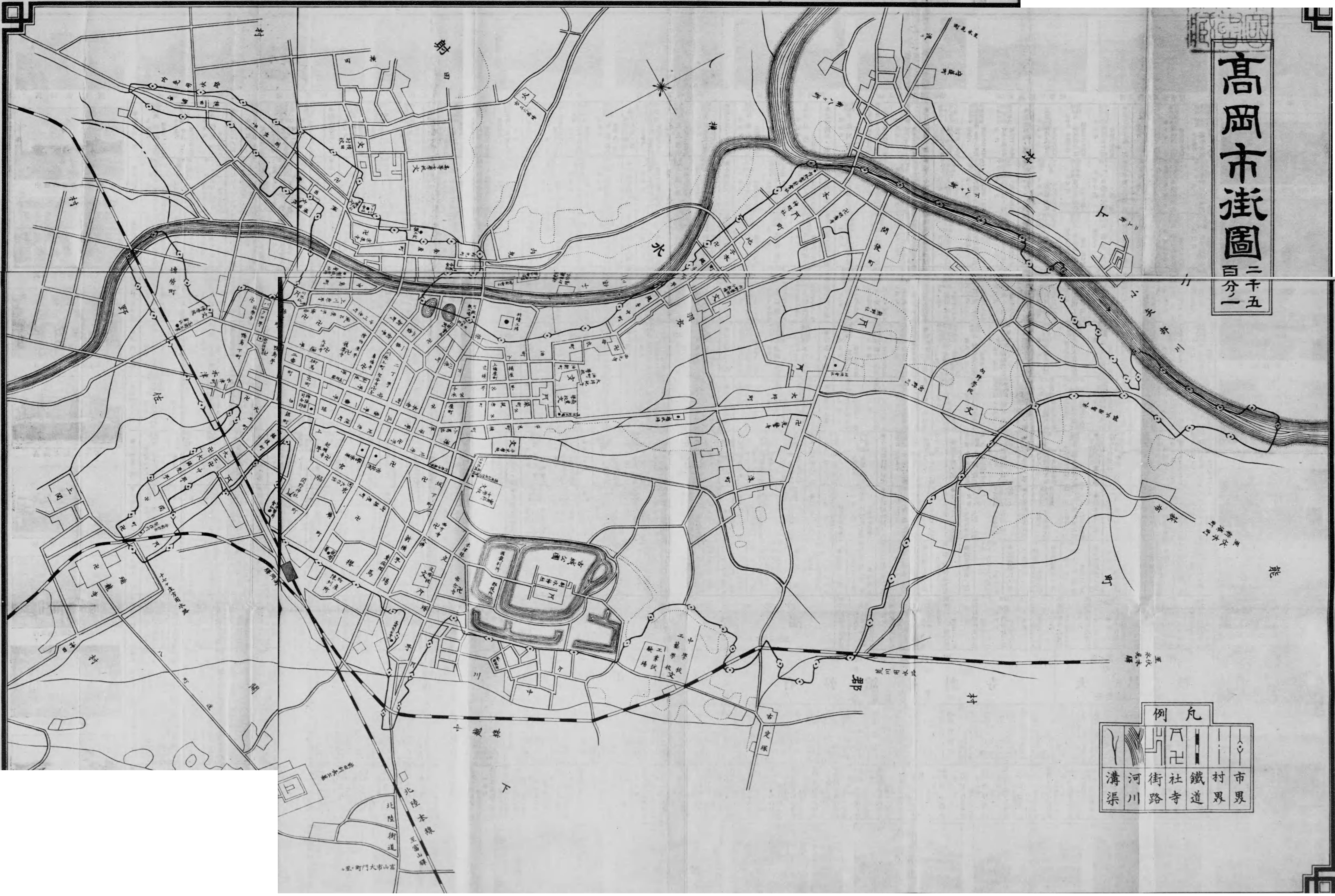 大正年間の高岡市街図